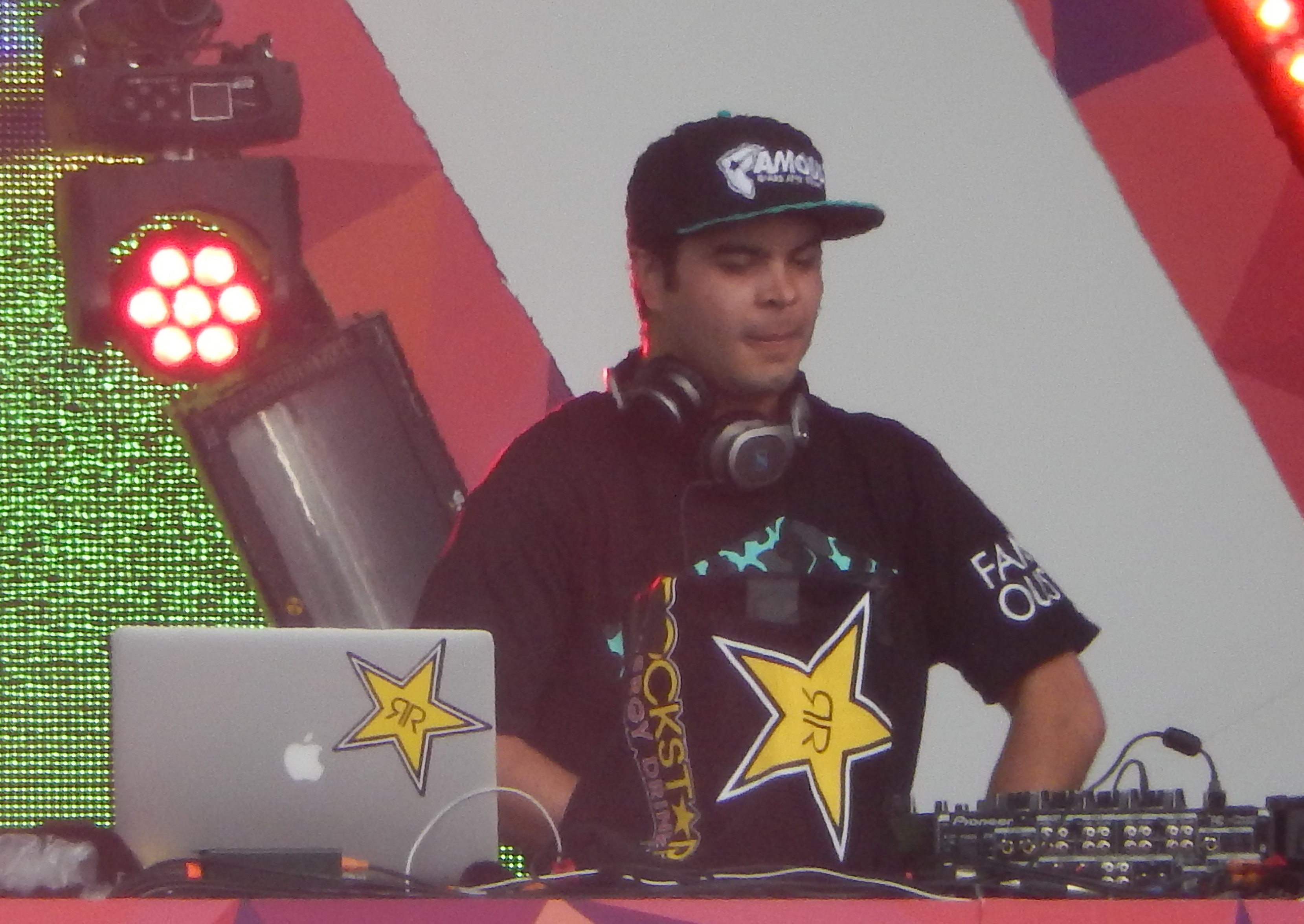 Datsik @ Spring Awakening 6/15/2014